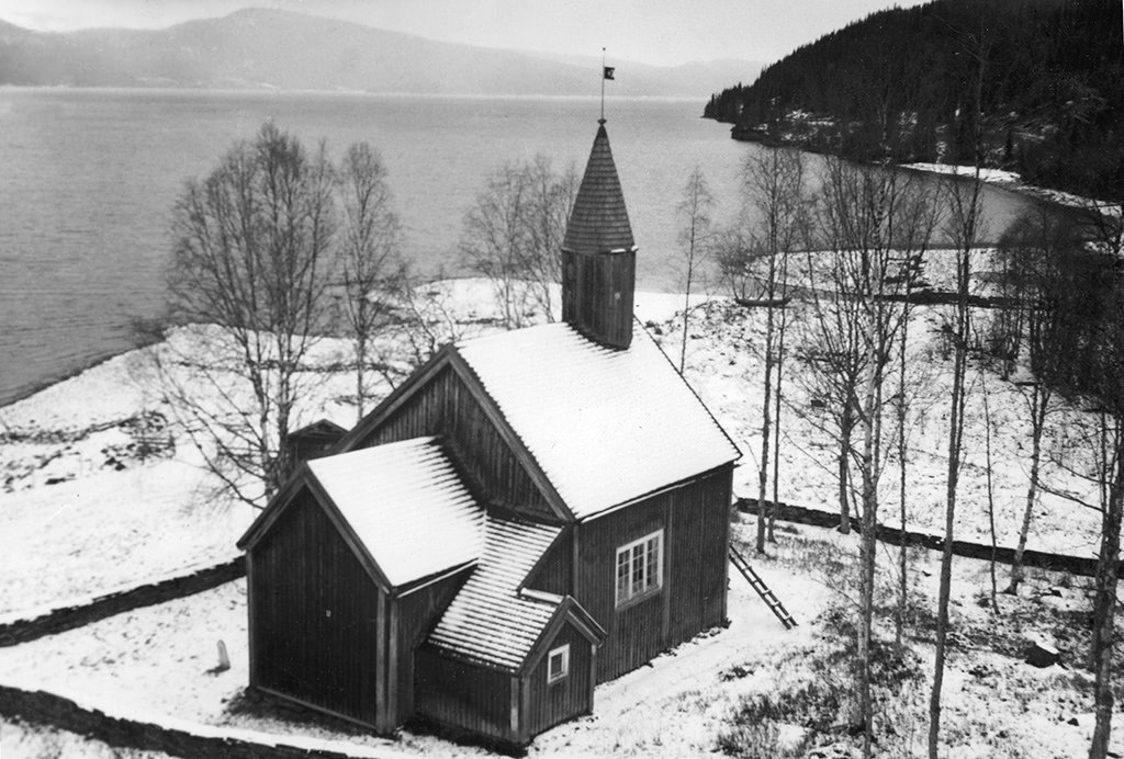 Viken chapel by lake Kvarnbergsvattnet. The wooden chapel was originally built in 1793 by Norwegian settlers. It has been rebuilt and restored several times. Architect Gösta Rollin (who took the image above) was in charge of a restoration in 1950-1953. Vikens kapell vid Kvarnbergsvattnet. Träkapellet byggdes ursprungligen 1793 av norska nybyggare. Det har byggts om och restaurerats flera gånger. Arkitekt Gösta Rollin (som tog bilden) ledde en restaurering 1950-1953. Parish (socken): Frostviken Province (landskap): Jämtland Municipality (kommun): Strömsund County (län): Jämtland Photograph by: Gösta Rollin Date: 1957 Format: Print Persistent URL: Read more about the photo database (in english)